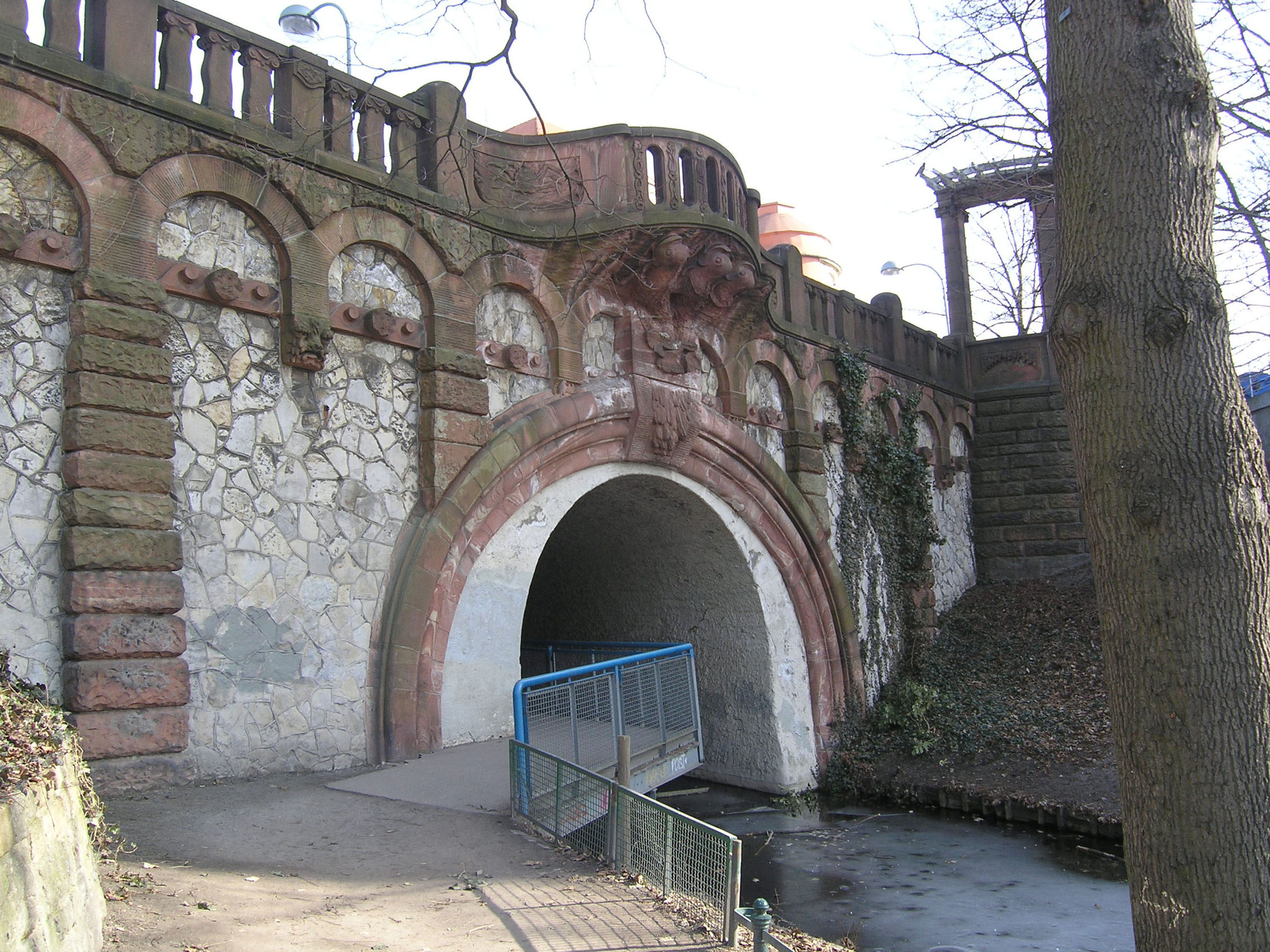 Lietzenseebrücke, Berlin